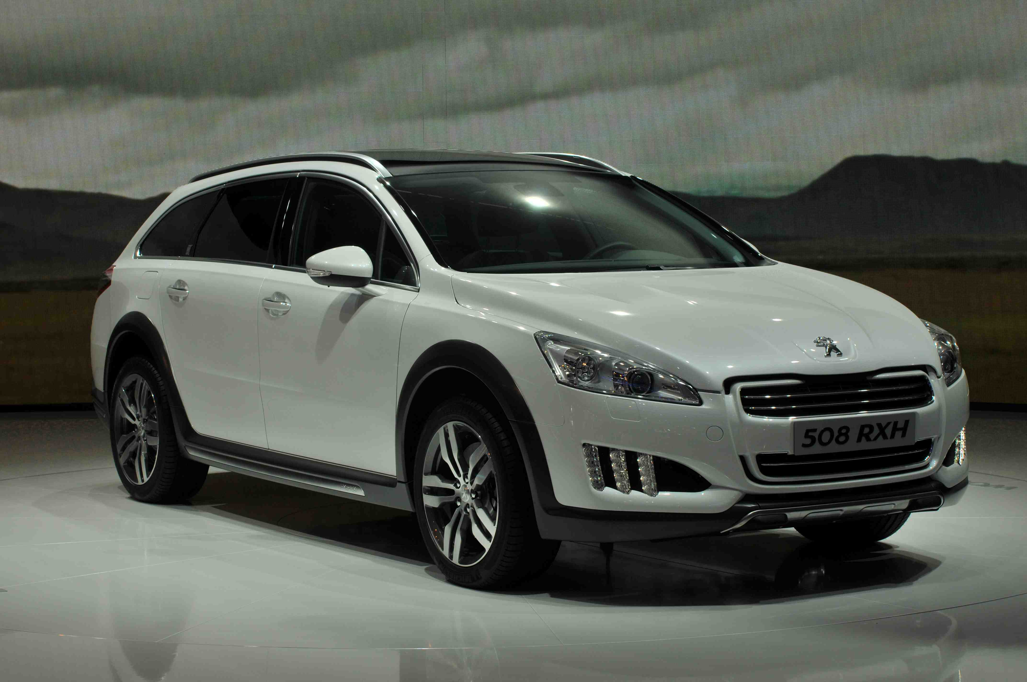 IAA 2011 - Internationale Automobilausstellung in Frankfurt/Main